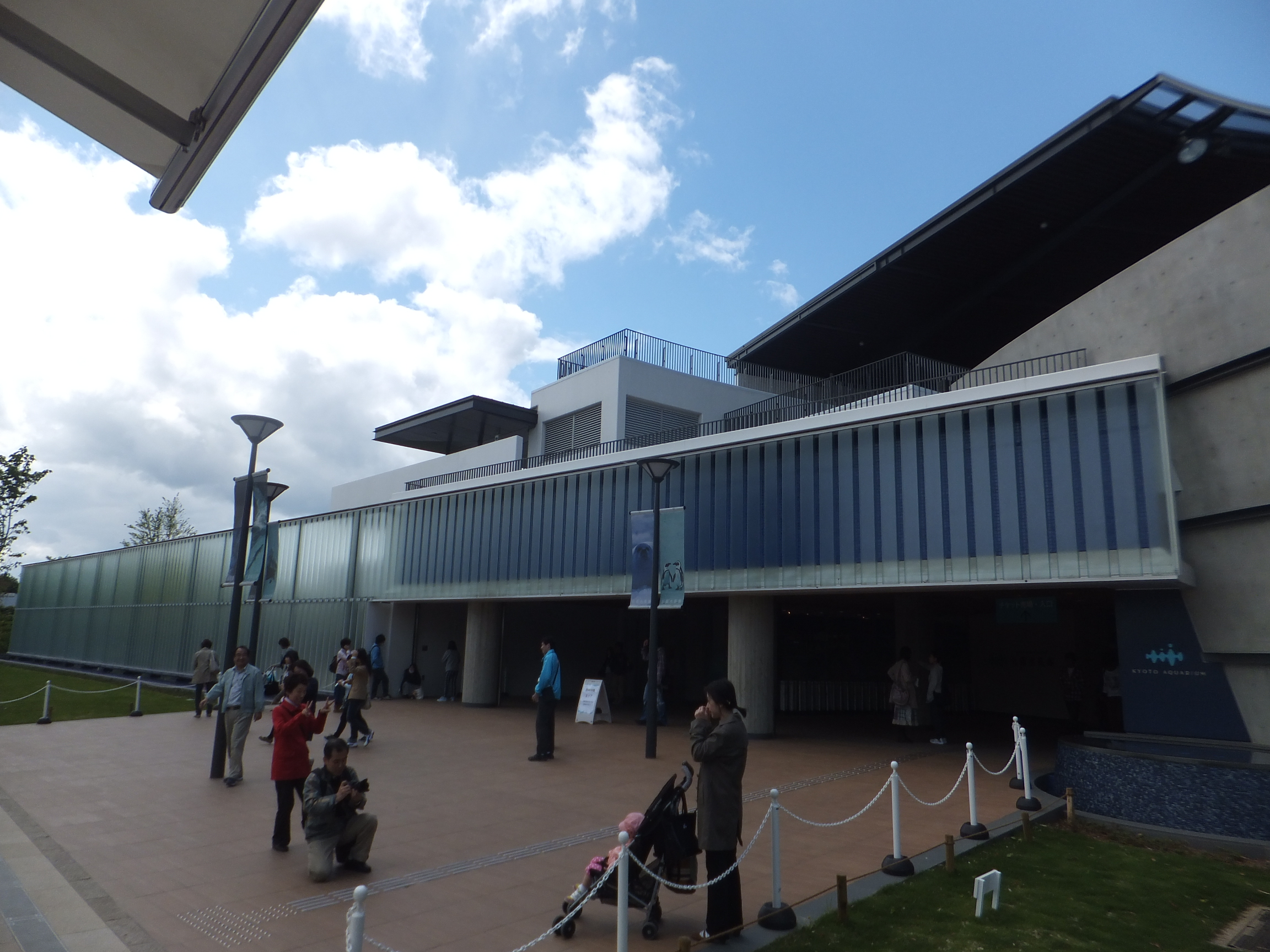 京都水族館 （2013年5月2日）